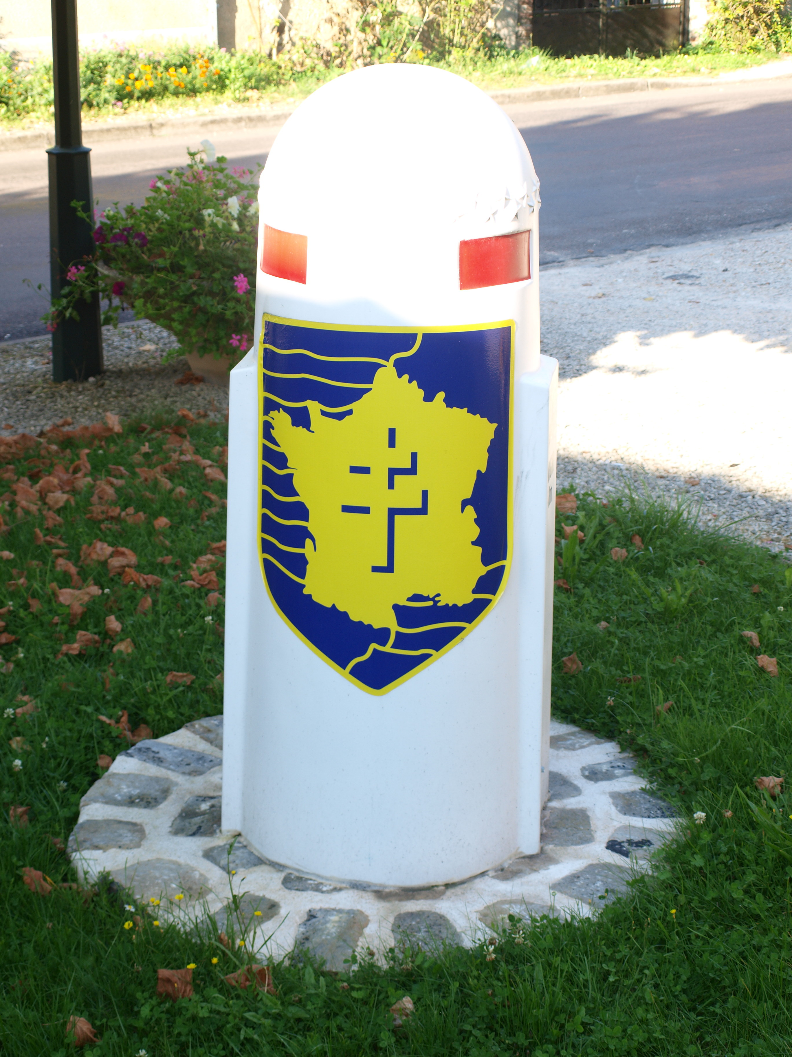 Thorigny-sur-Oreuse (Yonne, France) ; commune associée de Fleurigny : voie de la 2ème DB